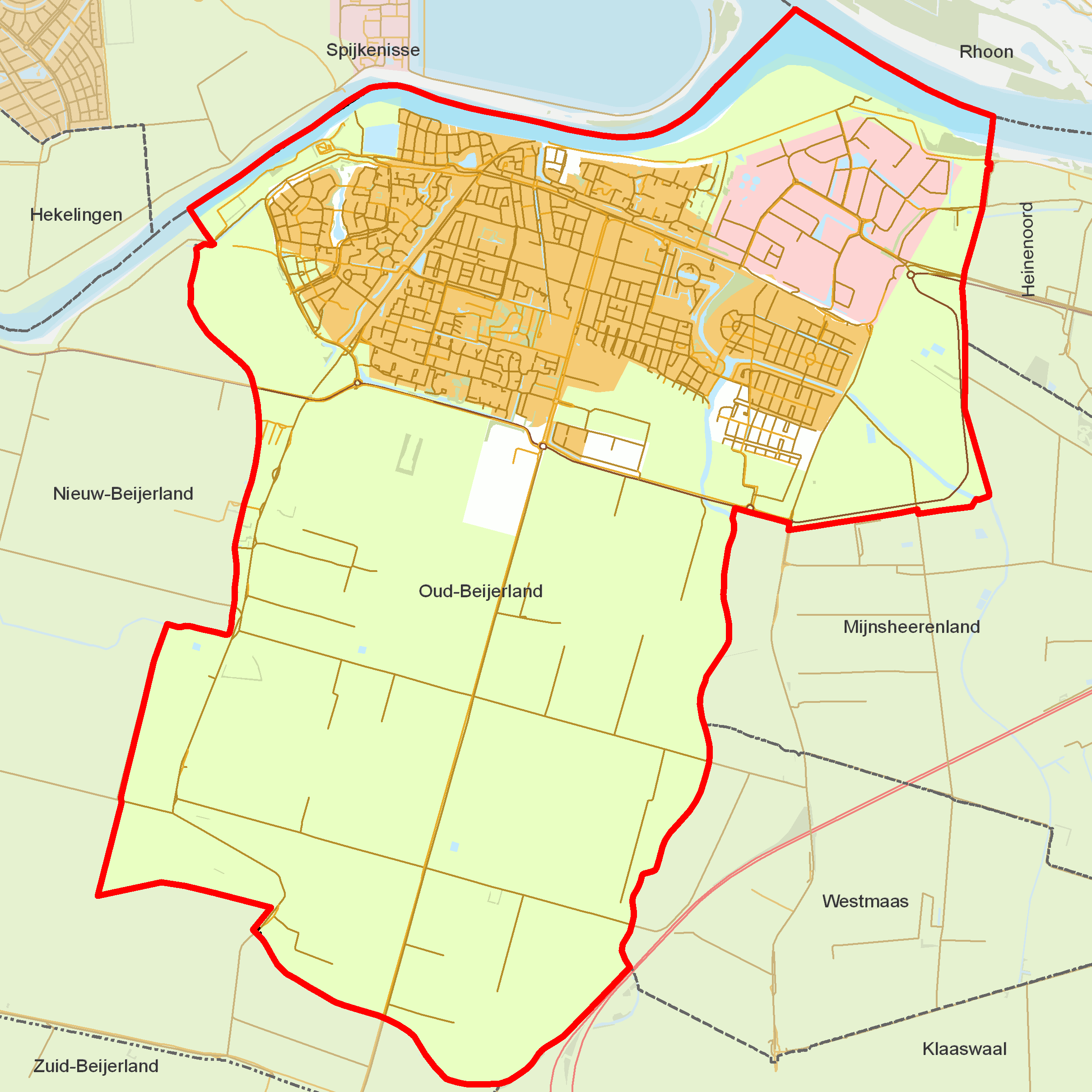 BAG woonplaatsen - Gemeente Oud-Beijerland.png